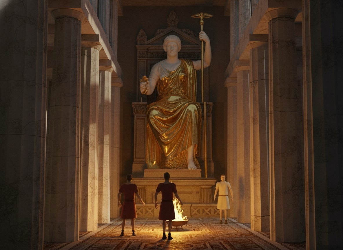 Schéma de l'intérieur du temple d'Héra, Héraion d'Argos.